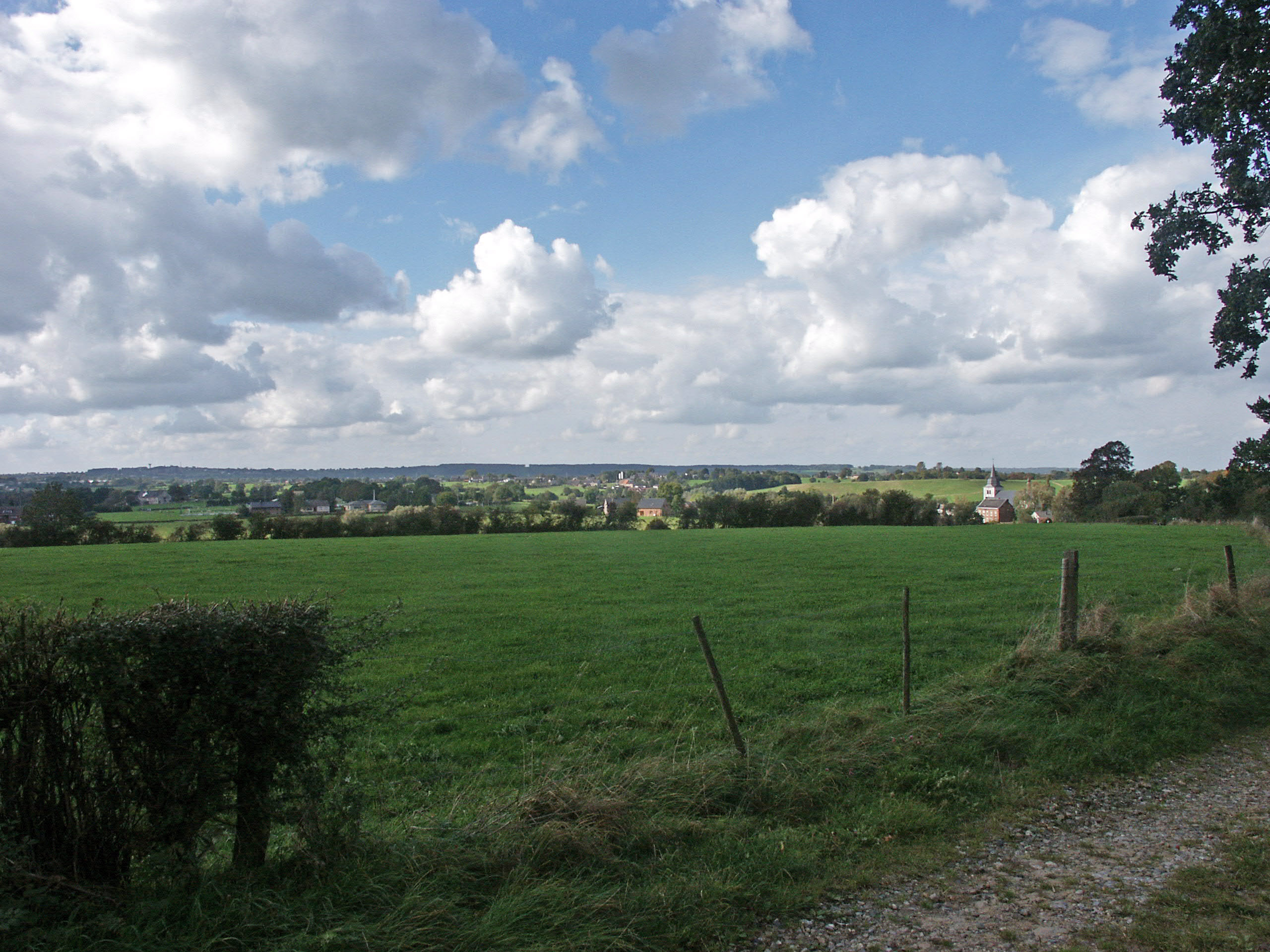 Blick über Lontzen